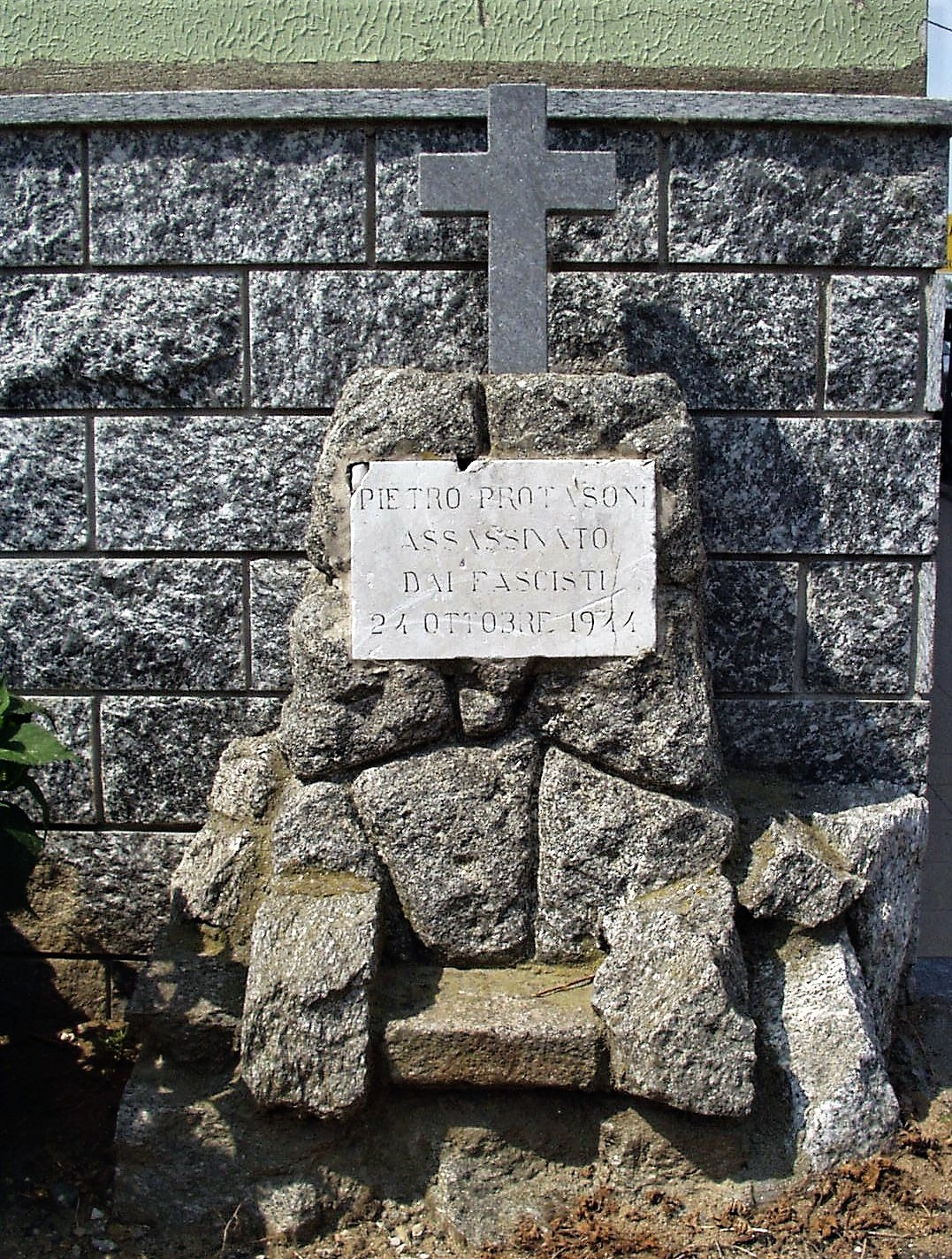 cippo con la scritta in memoria dell'assassinio del partigiano e la data di morte